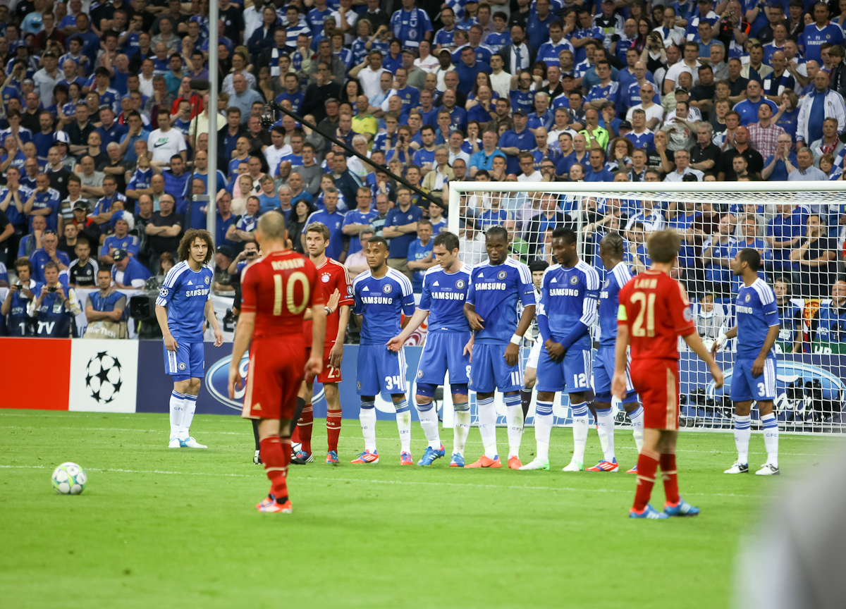 RA1_6082